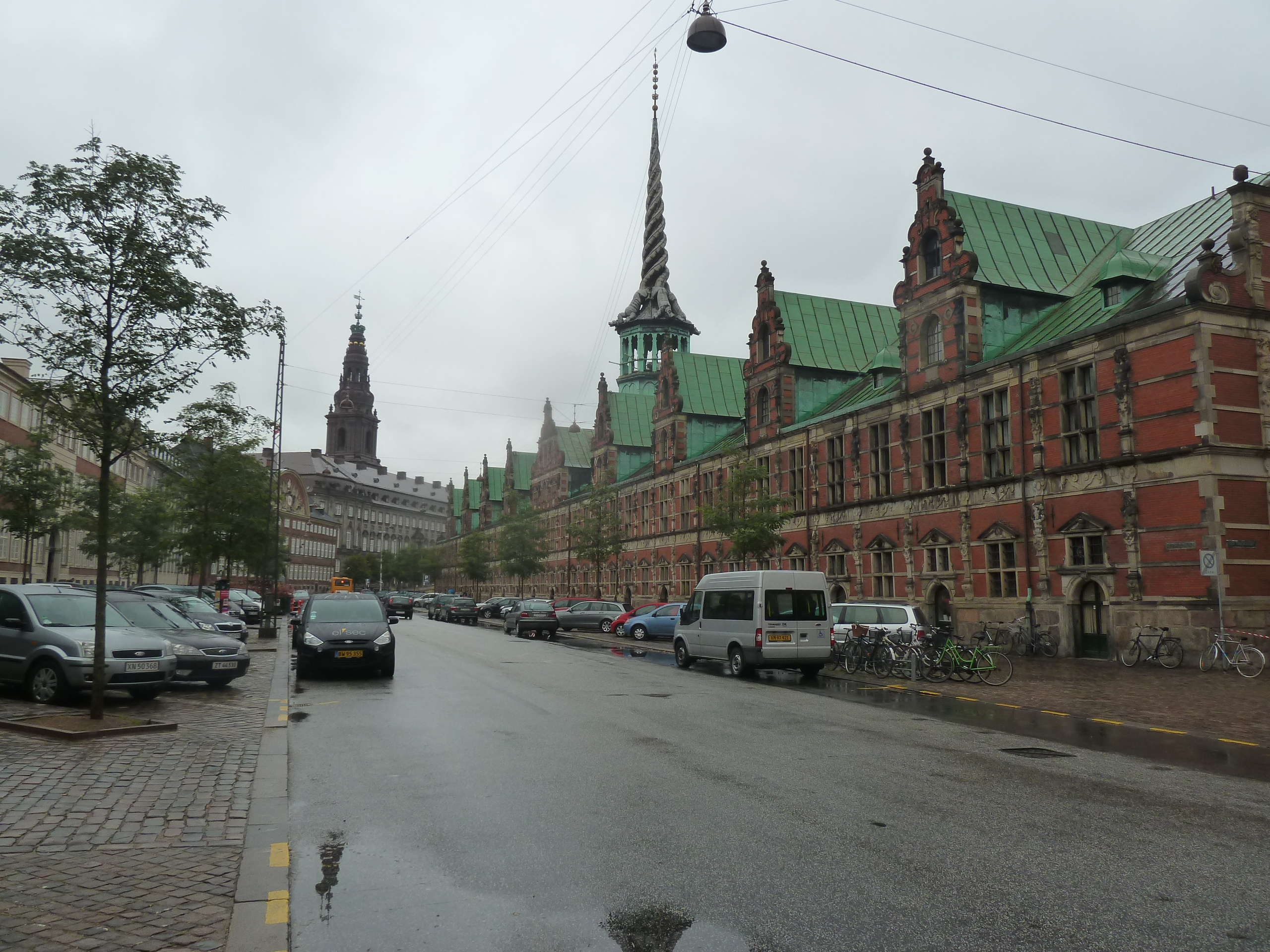 The street Slotsholmsgade on Slotsholmen in Copenhagen.